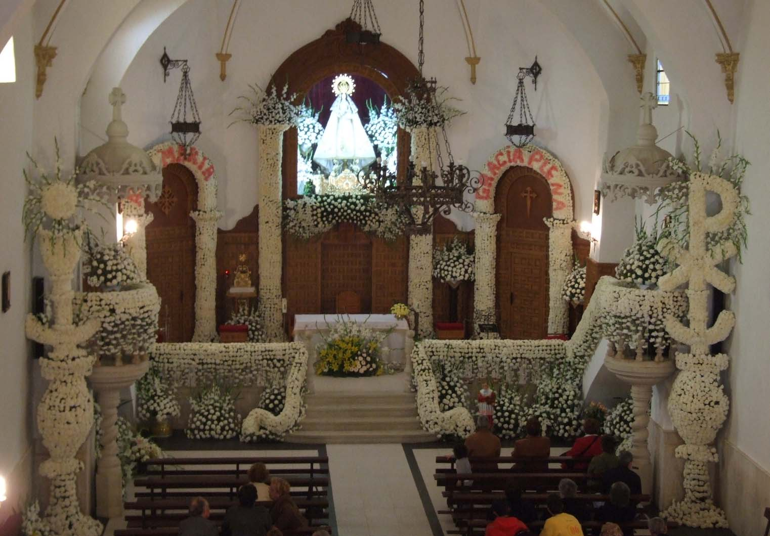 Ornamento floral del altar mayor en la ermita grande Virgen del Monte.